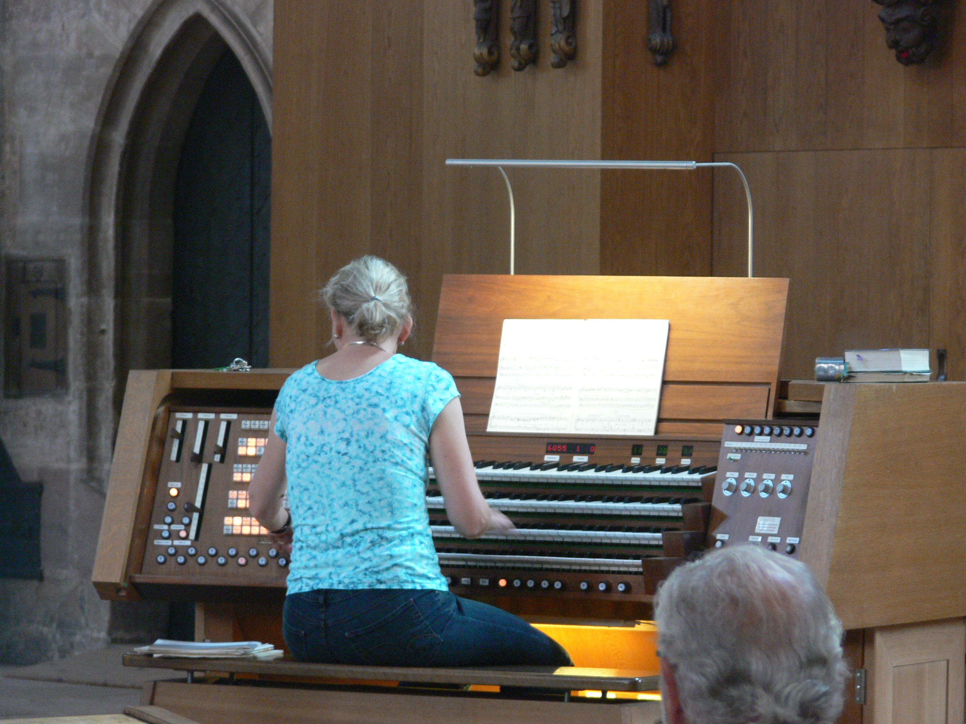 Eglise Saint-Sébald de Nuremberg